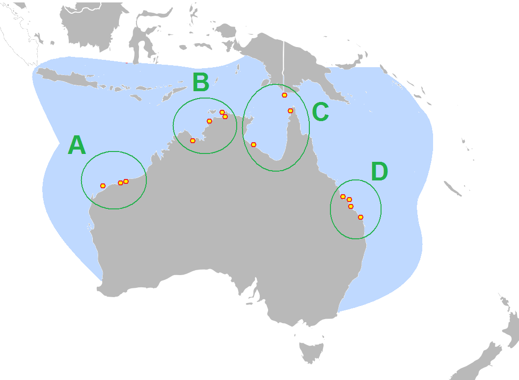 Distribution of the Flatback turtle